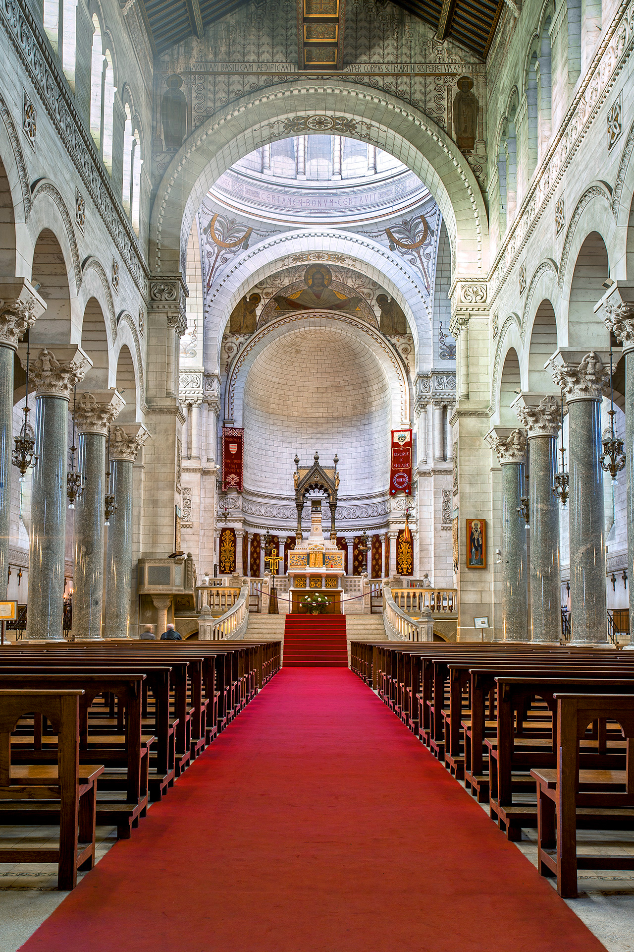 Vue sur la nef depuis le portique .